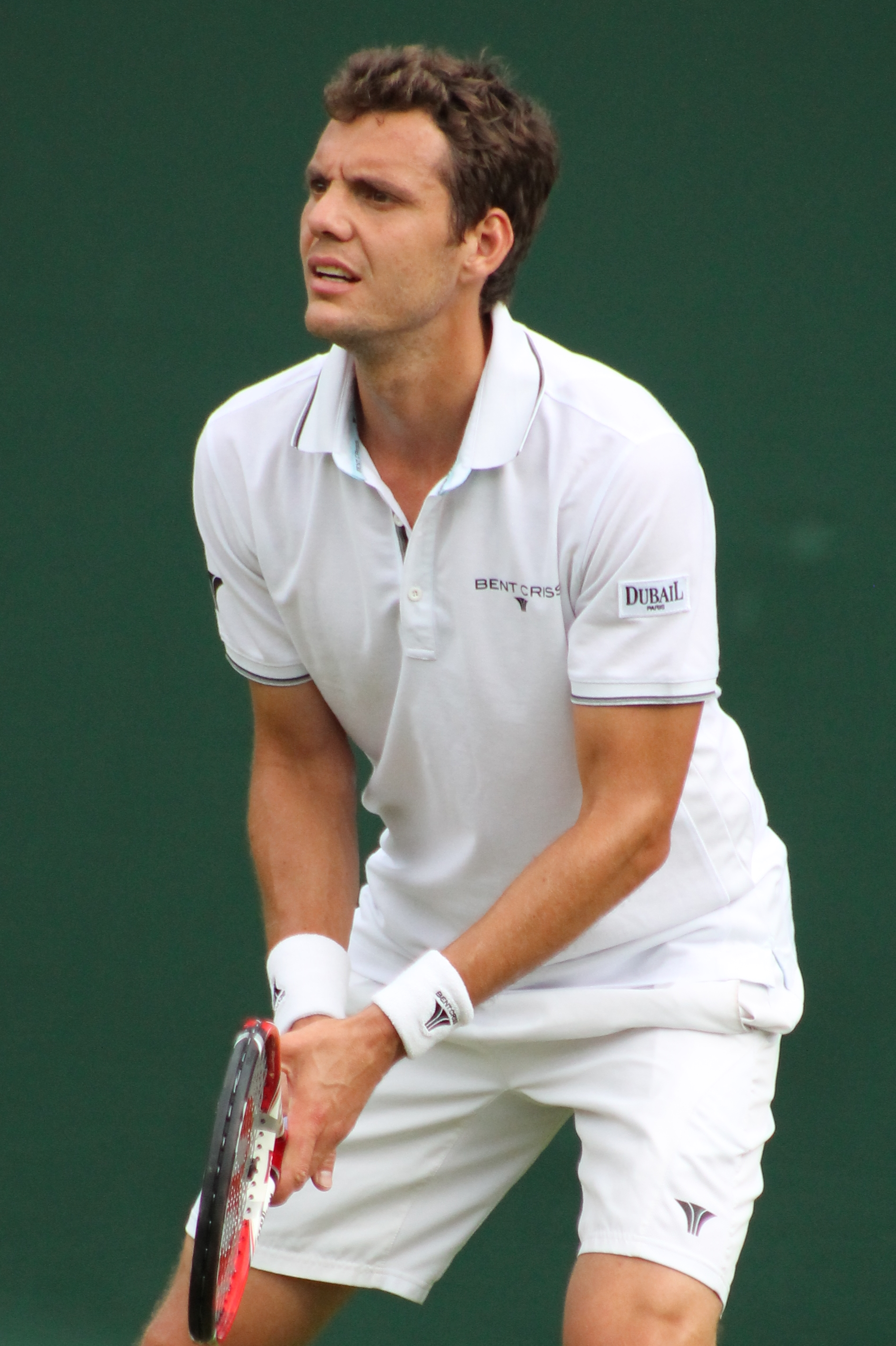 Mathieu WM14